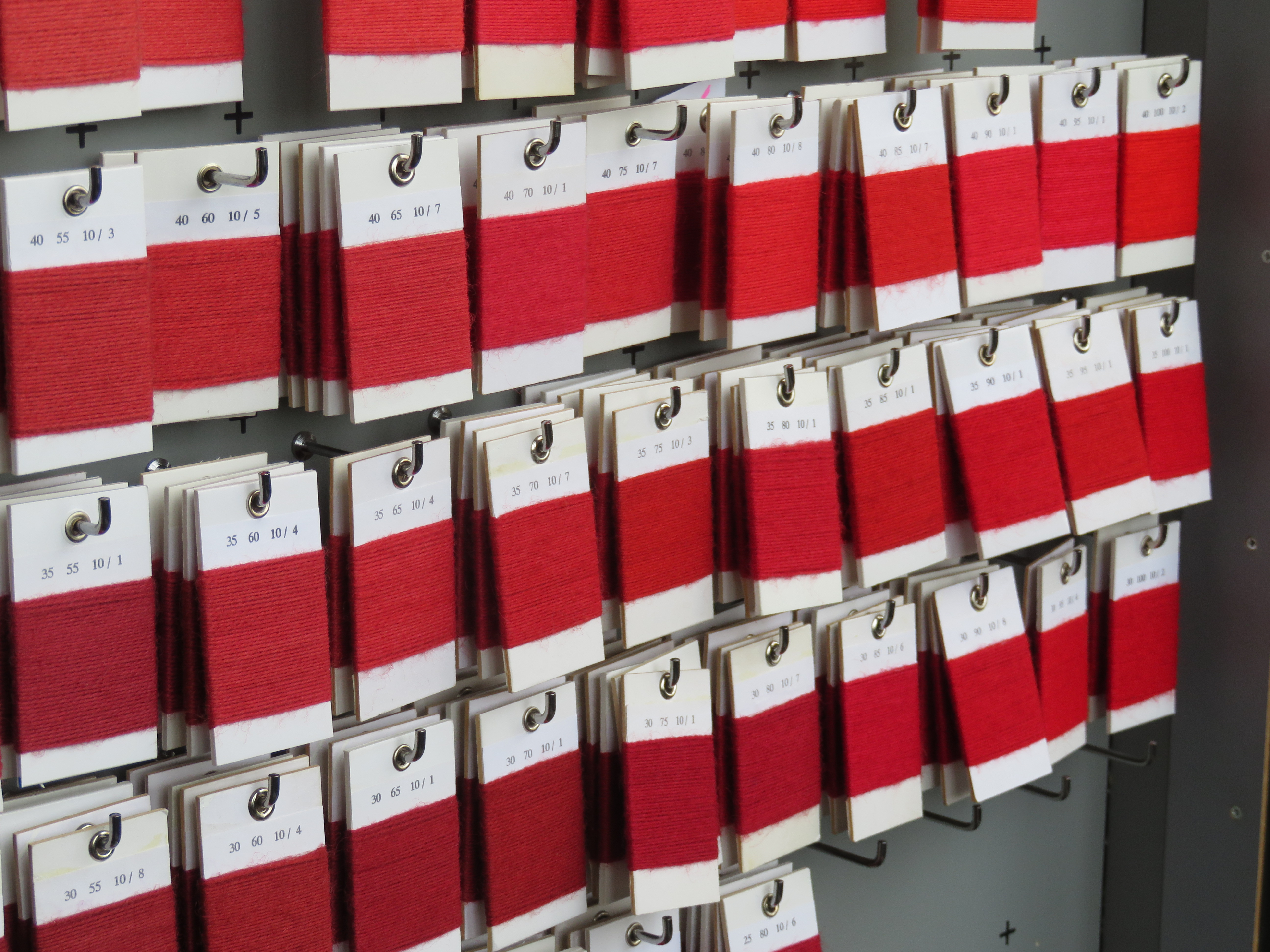 Échantillons rouges du nuancier des Manufactures nationales.